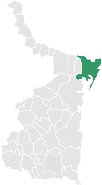 Municipio de Matamoros Tamaulipas, México